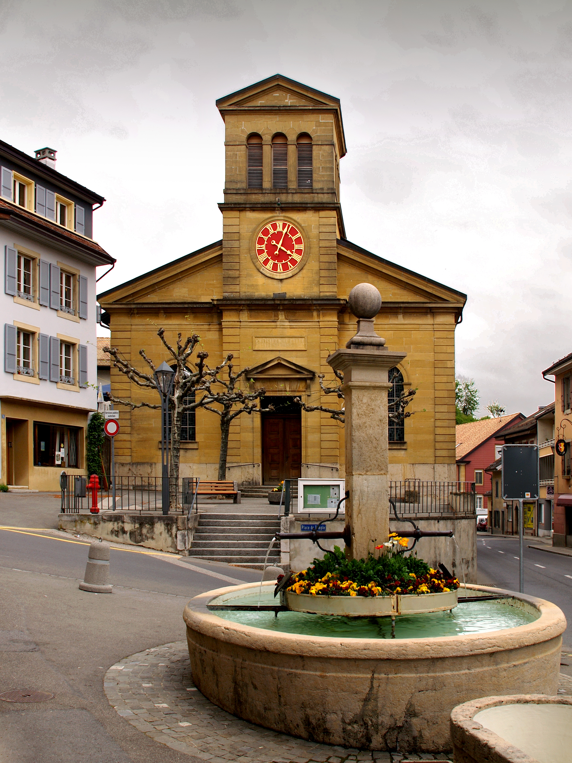 La Sarraz (Suisse) - Le temple